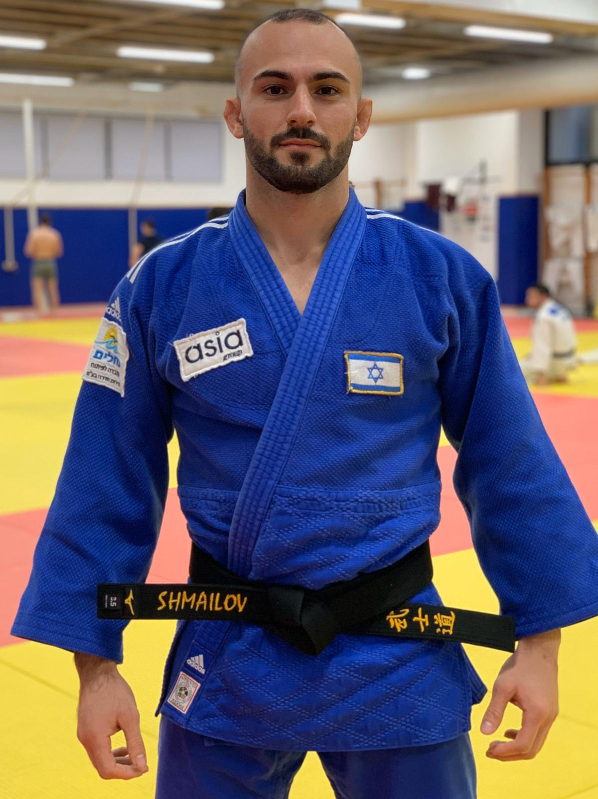 ברוך שמאילוב, גודקא ישראלי במשקל 66 ק"ג. נציג ישראל במשקל זה לאולימפיאדת טוקיו 2020